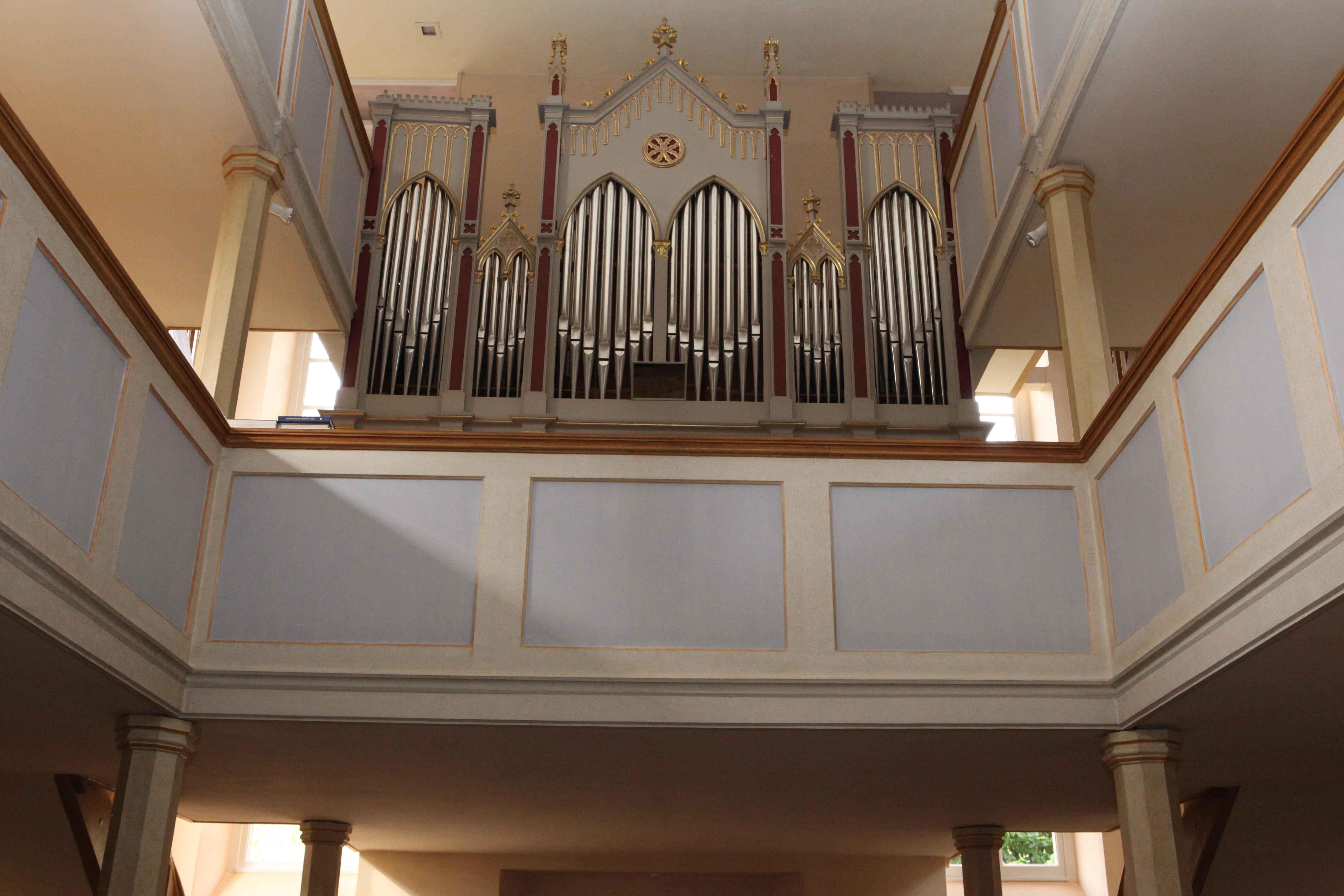 Elsa, Evangelisch-lutherische Kirche, Orgel